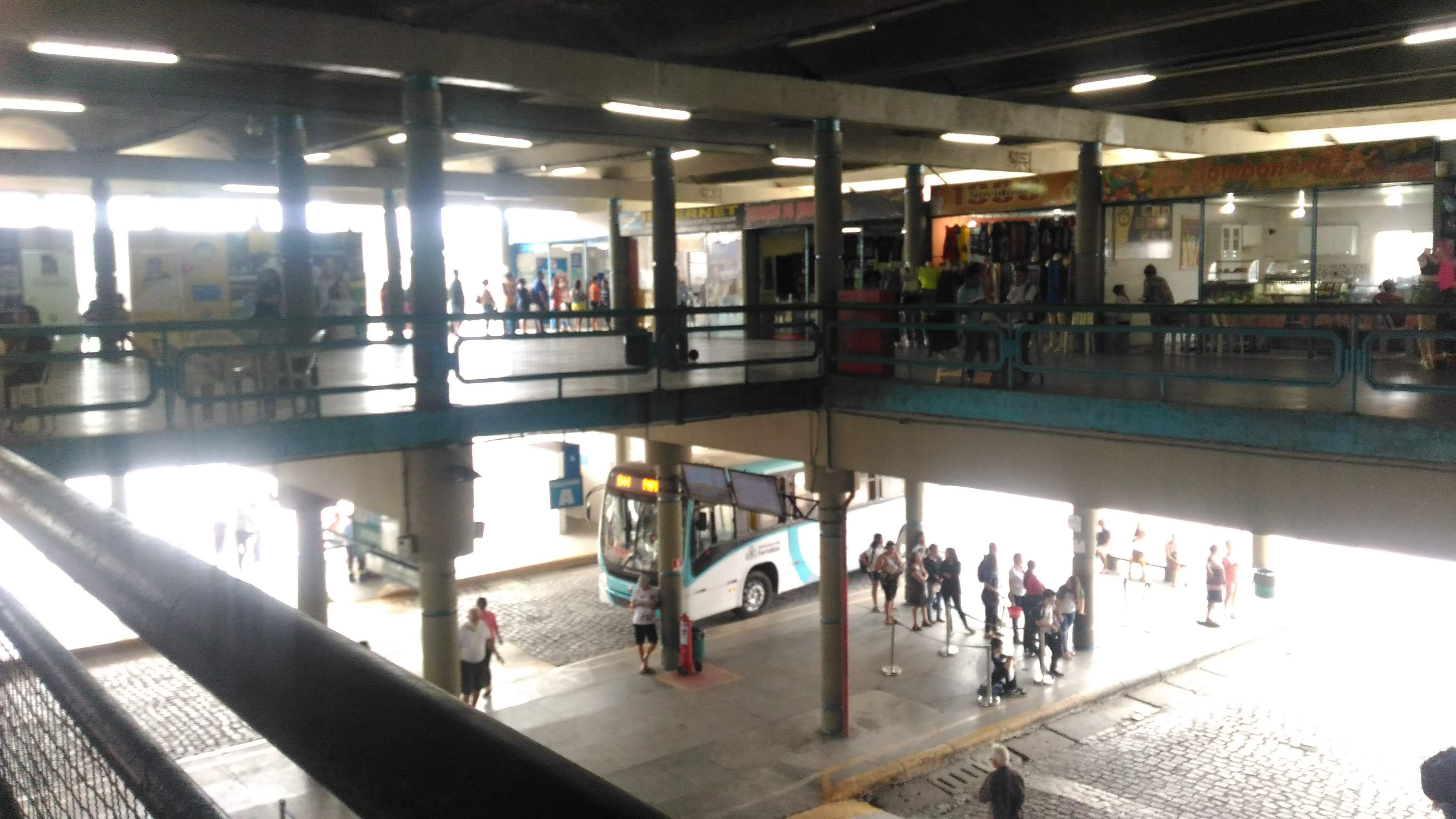 Primeiro e segundo piso do terminal Parangaba.